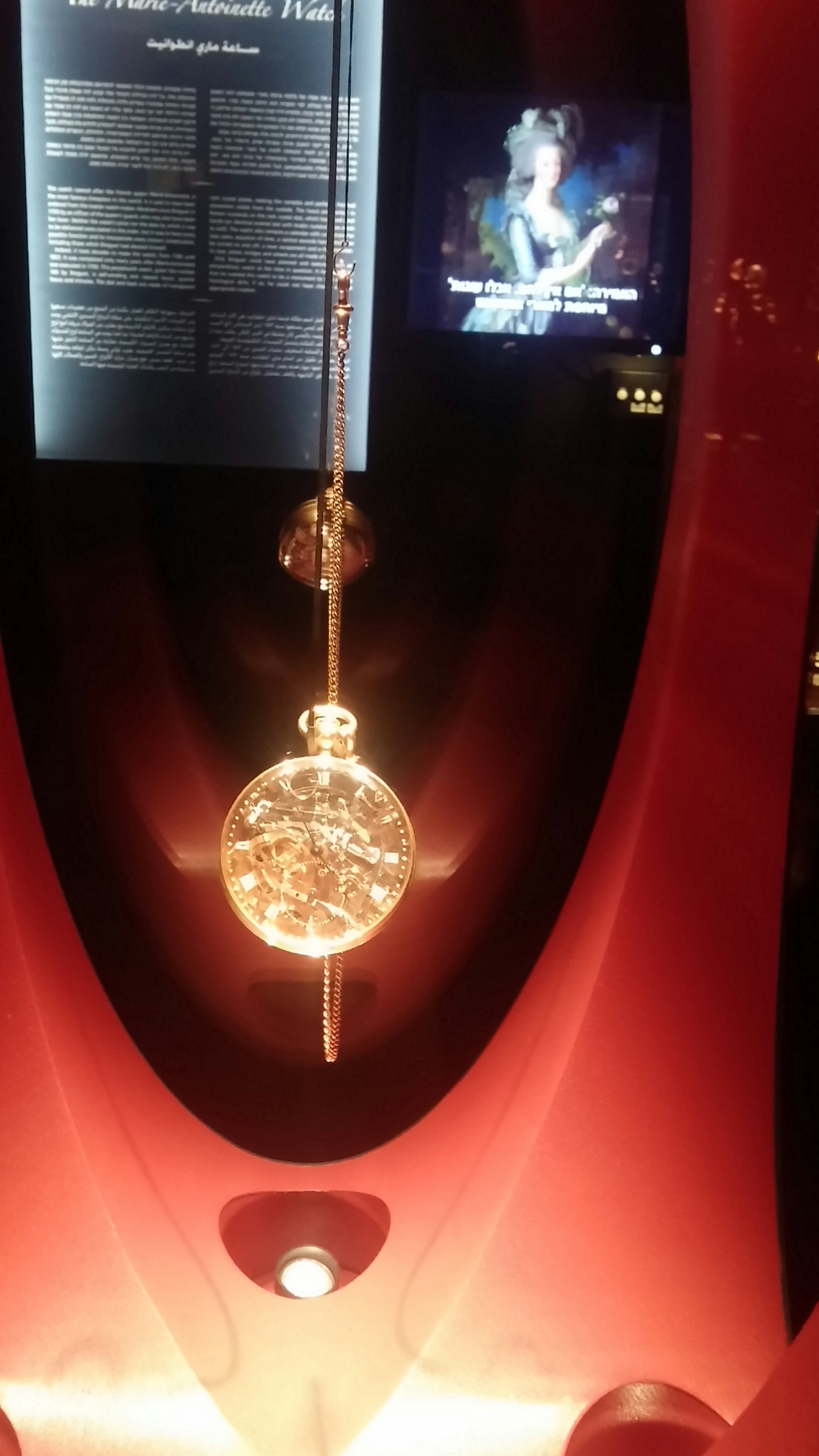 שעון דיוצר ע"י אברהם-לואי ברגה עבור מארי-אנטואנט ומוצג במוזיאון לאמנות האסלאם בירושלים